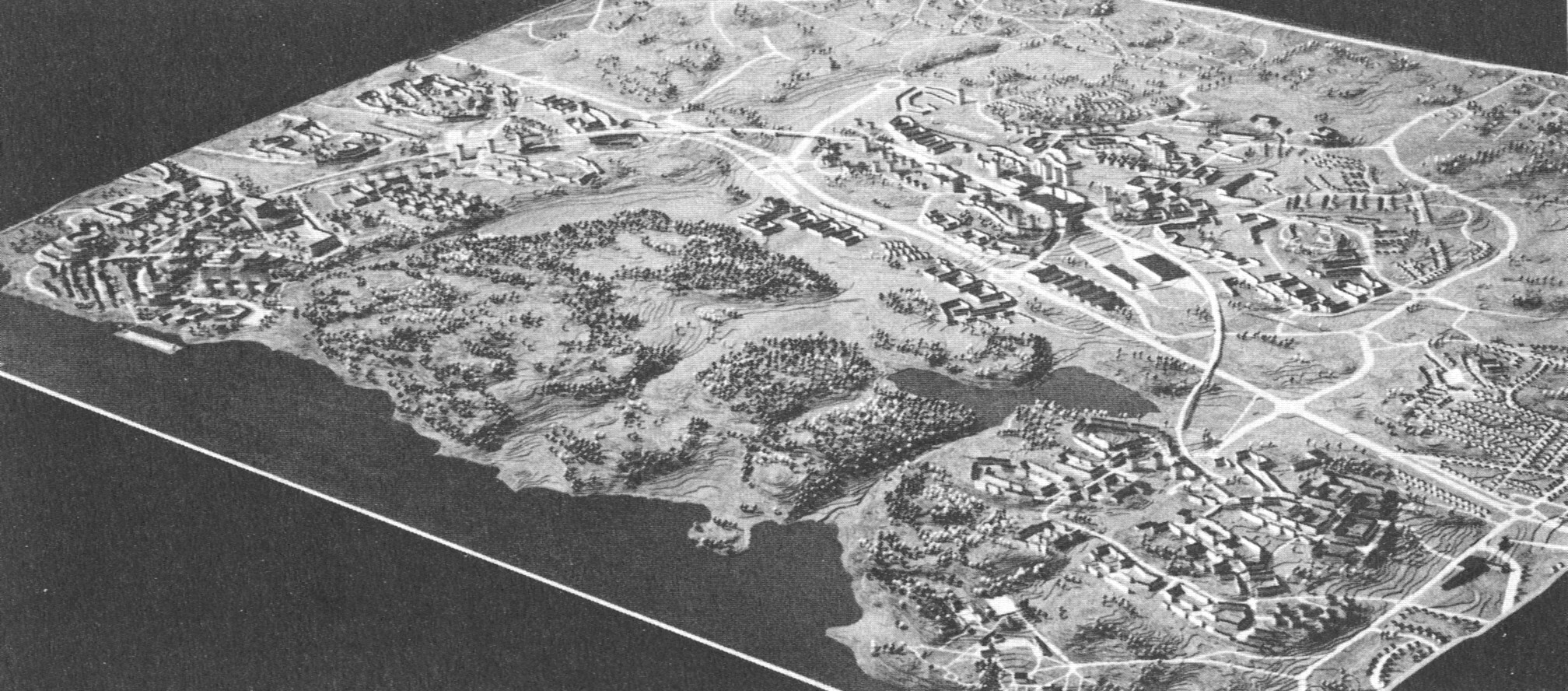 Modellen för "Vällingbygruppen" med Blackeberg i föregrunden, Råcksta och Vällingby i mitten och Hässelby strand längs till vänster